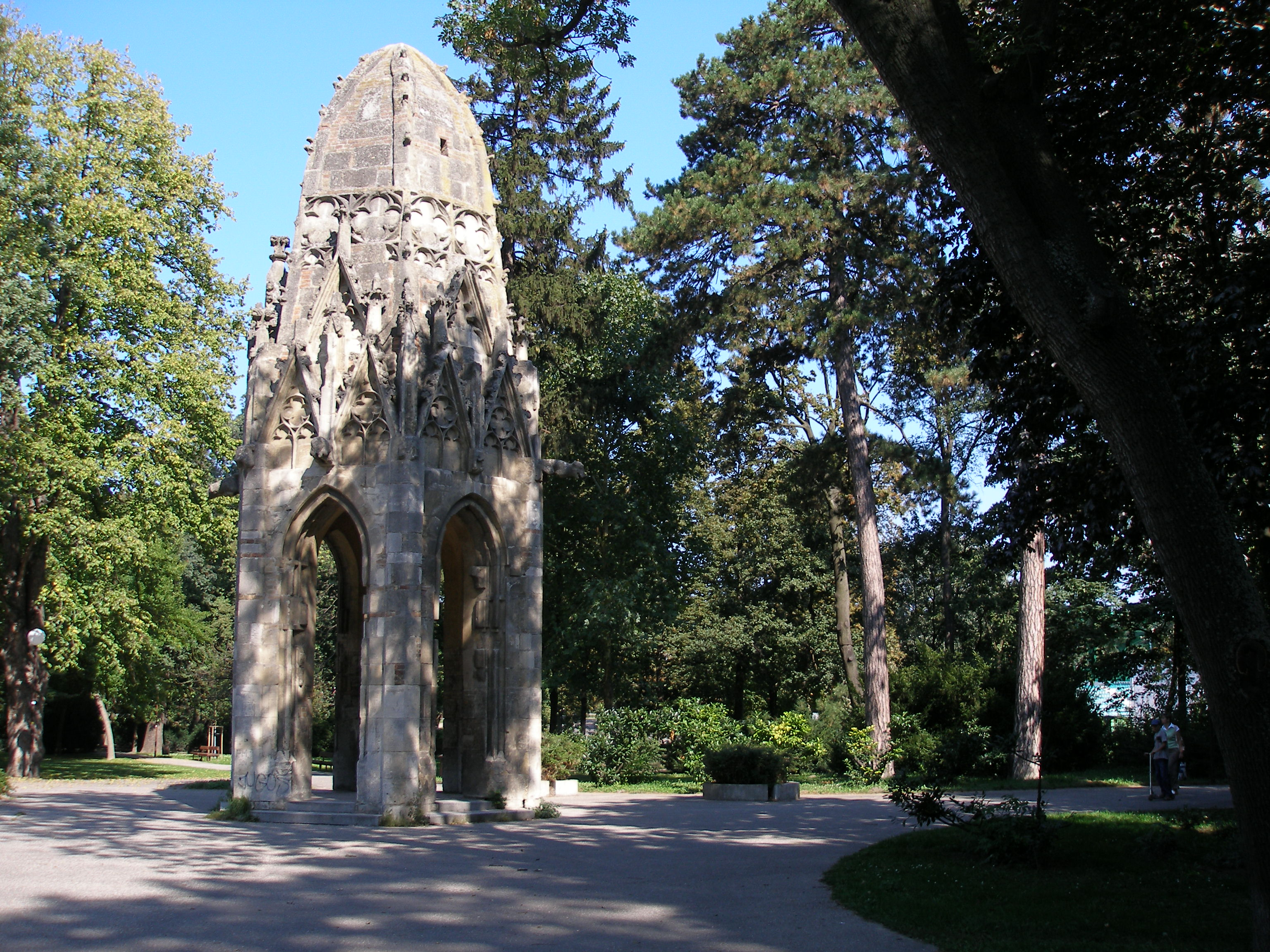 Gotická veža z františkánskeho kostola v Sade Janka Kráľa. Ide o jedinečný záhradný altánok, ktorý bol pôvodne vežou františkánskeho kostola.Sad Janka Kráľa, mesto Bratislava, Slovensko.